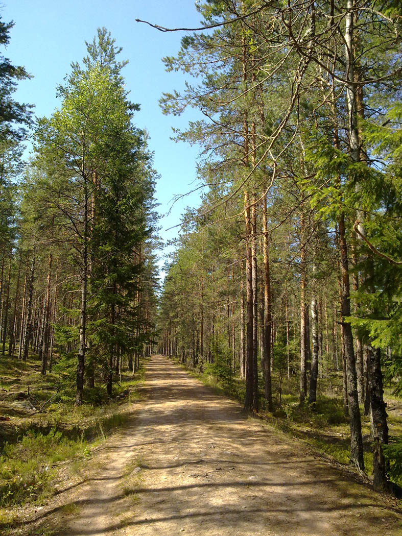 Дорога к озеру Большое Краснопёрское в посёлке Заходское Выборгского района Ленинградской области, по которой проходила линия парового трамвая